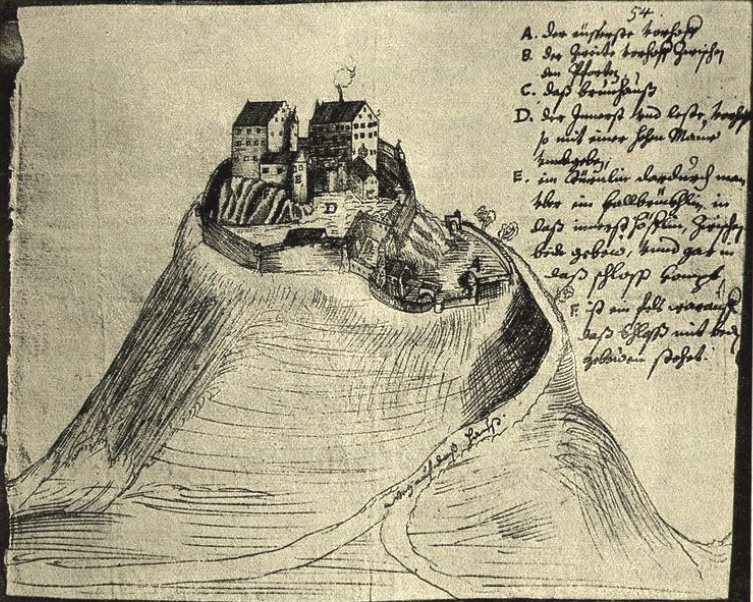 Burg Hohengeroldseck um 1645